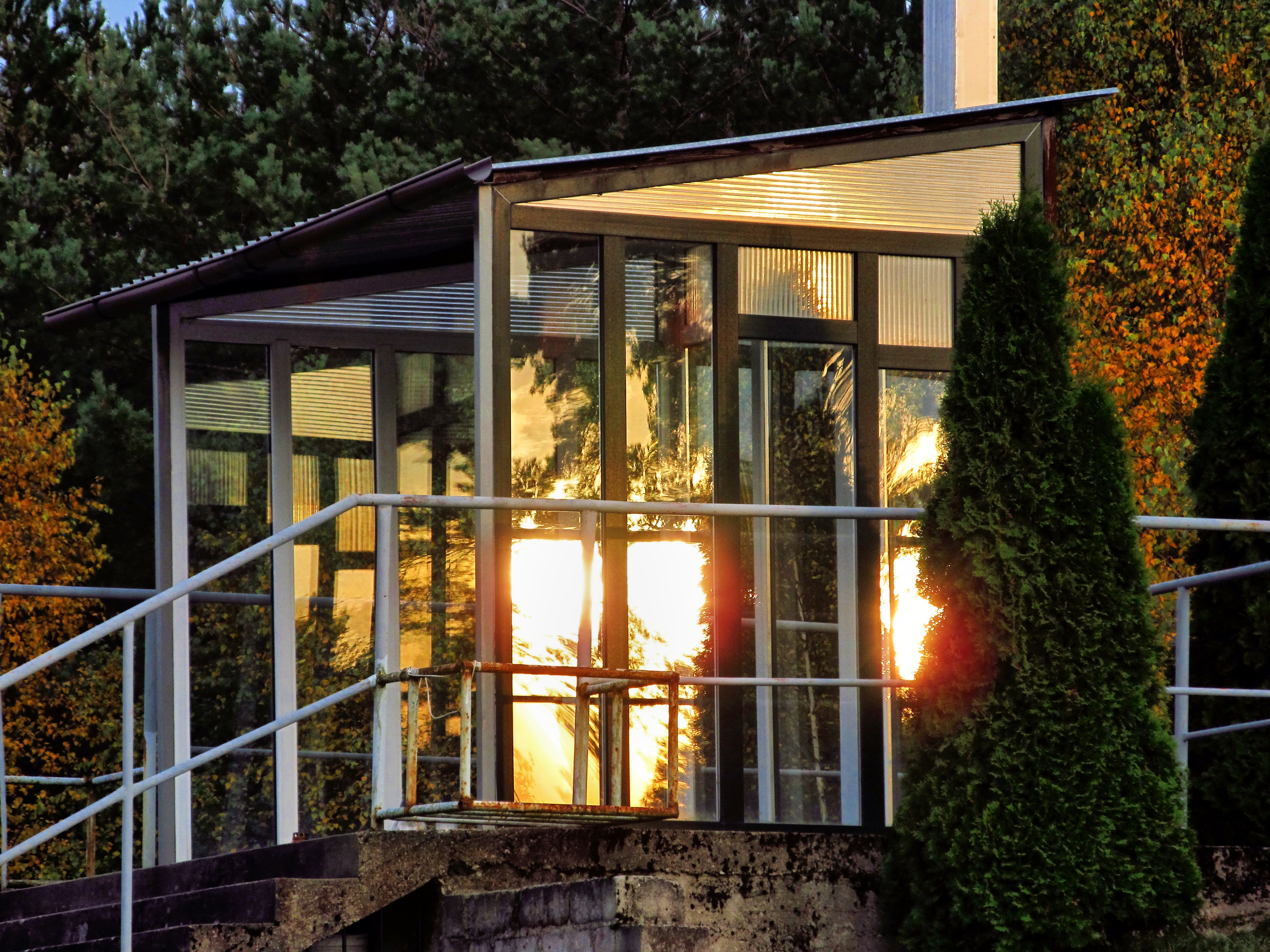 Miejsce pod ołtarz polowy na msze święte w dniu Wszystkich Świętych i Zaduszki